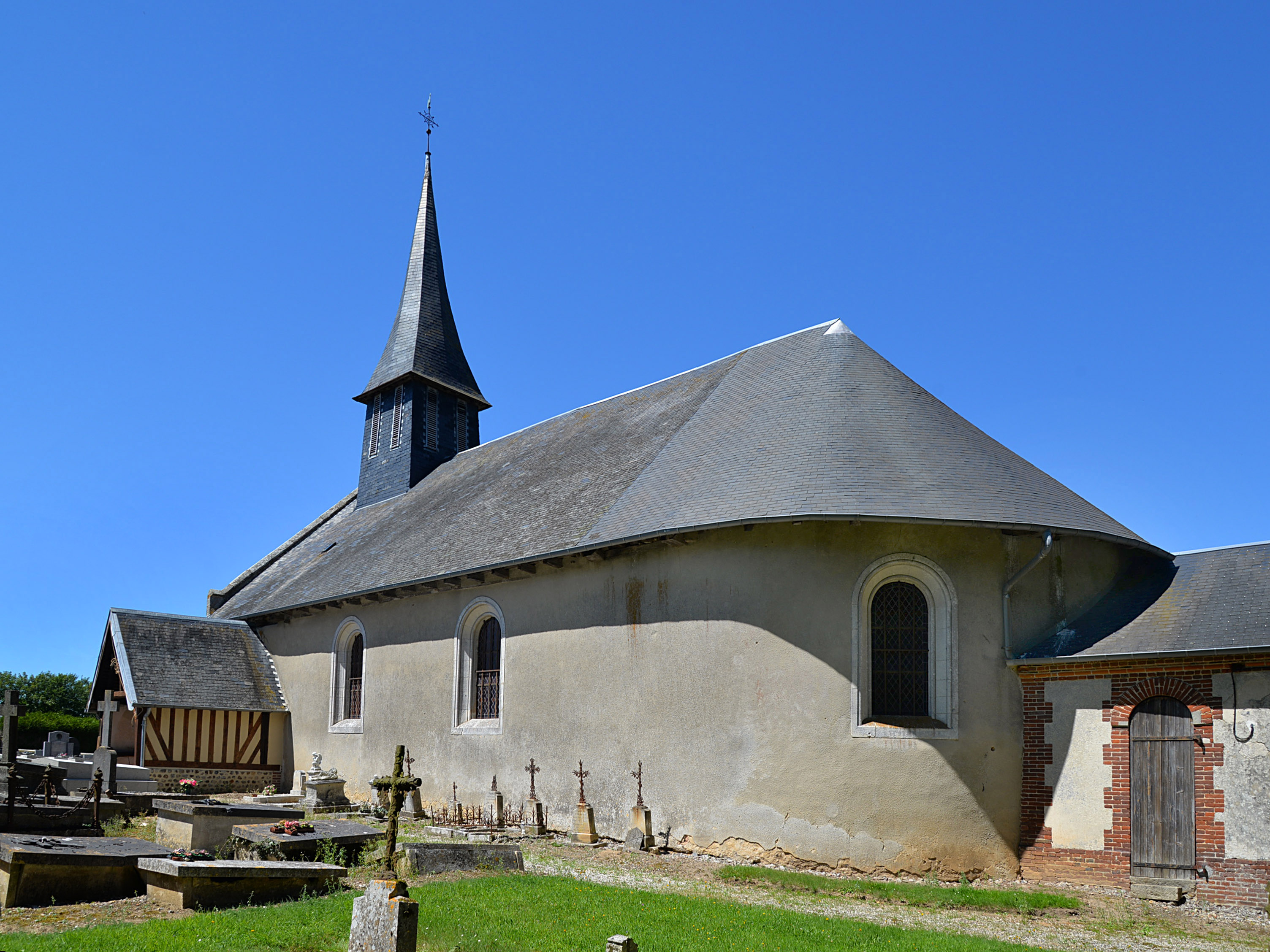 Friardel (Calvados)